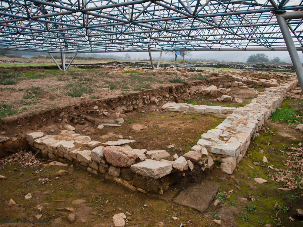 Campamento romano da Ciadella, Sobrado dos Monxes.